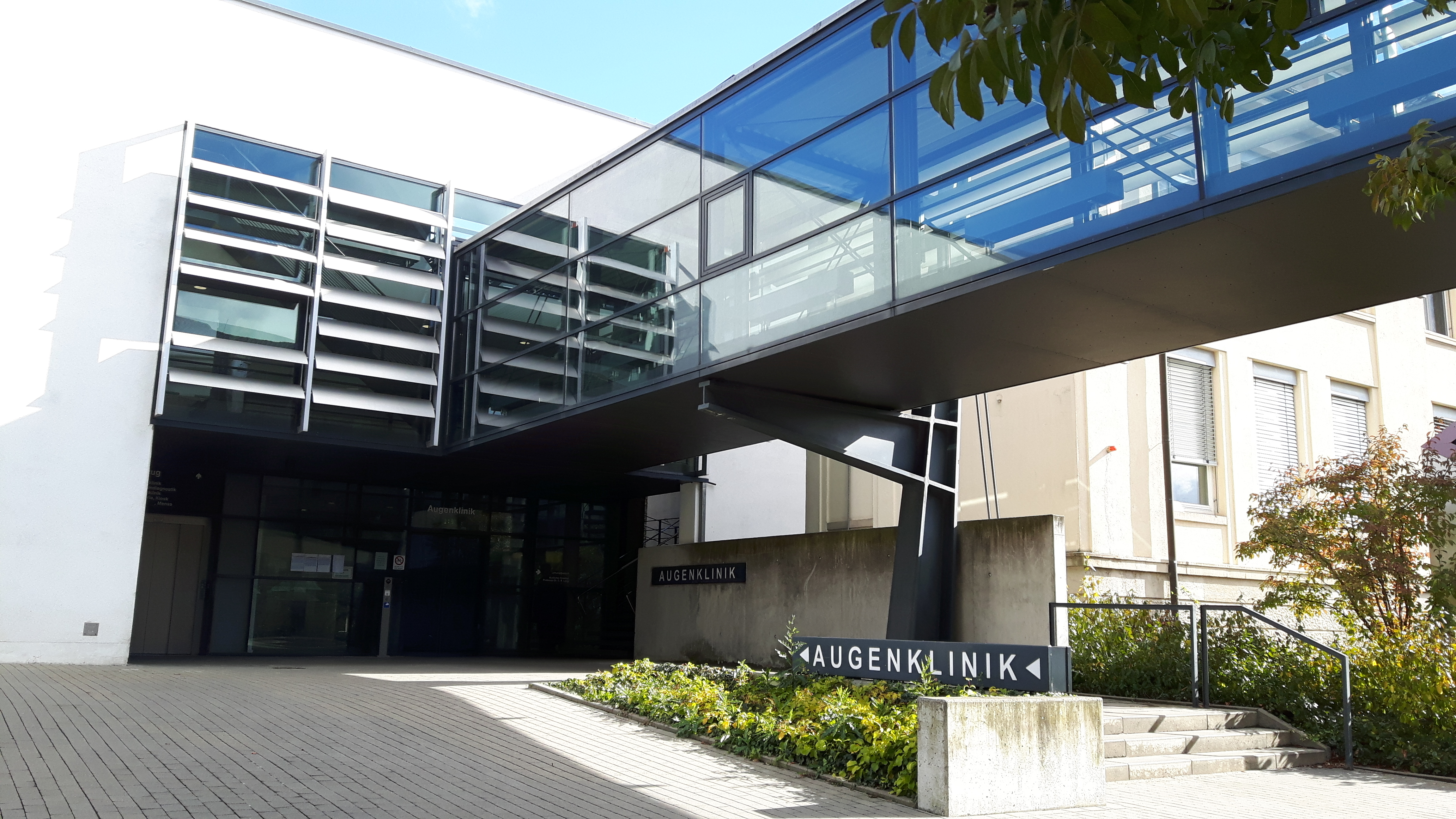 Eingangsbereich der Augenklinik des Universitätsklinikums Ulm auf dem Michelsberg